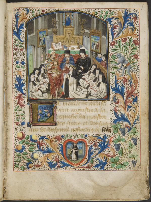 Marguerite de Flandres, fondatrice de l'hôpital, agenouillée devant le Christ, avec saint Augustin, l'évêque de Tournai et le maître de l'hôpital, entourée des soeurs augustines de l'hôpital.